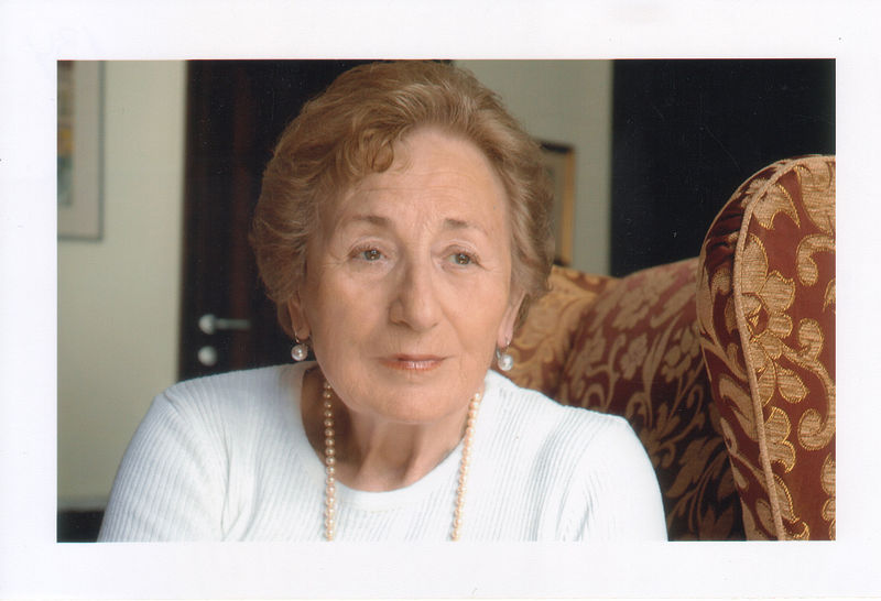 Portret Nevenke Petrić.